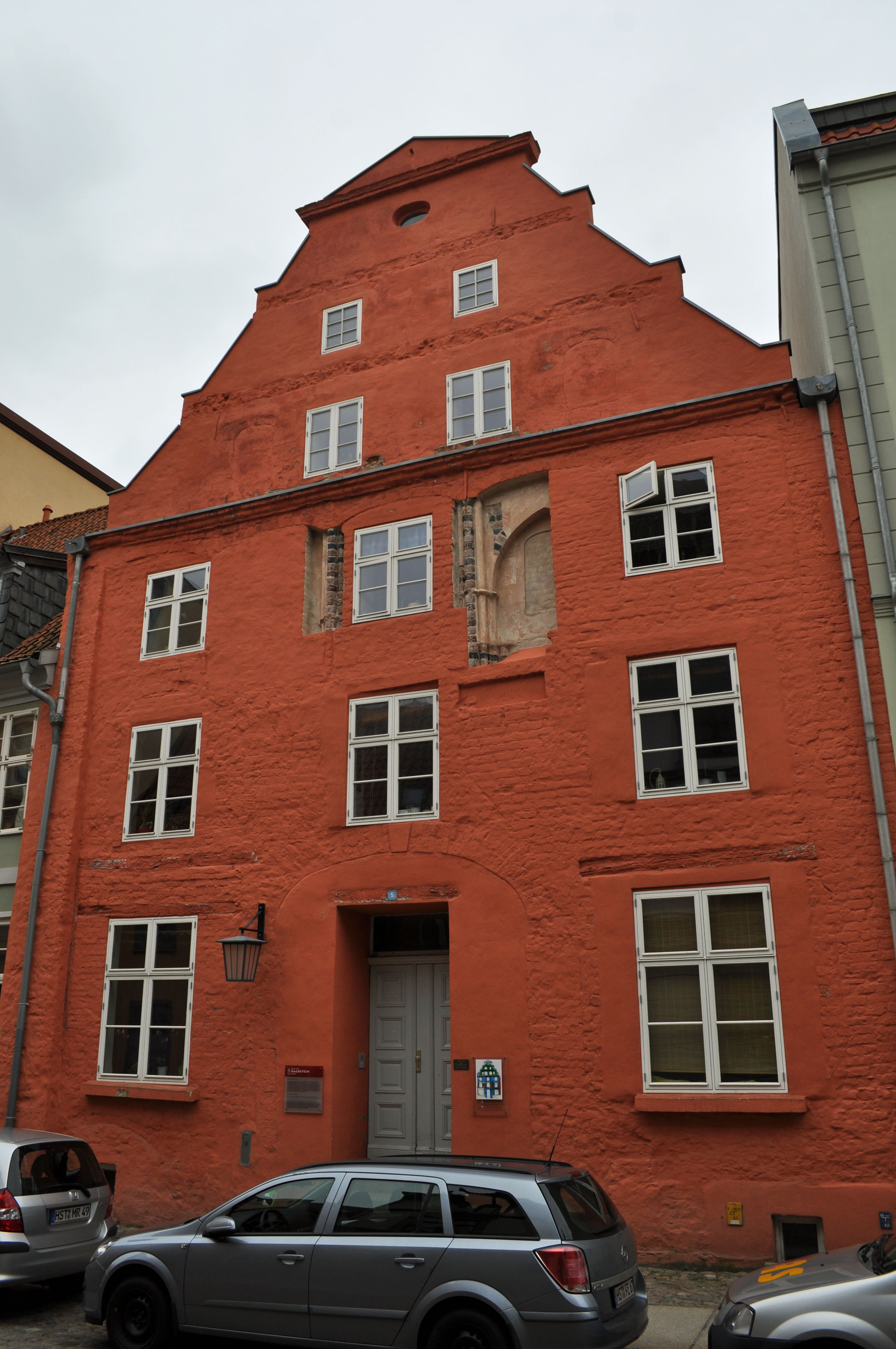 Gebäude bzw. Gebäudedetail in Stralsund. Straße und Hausnummer siehe Dateiname.